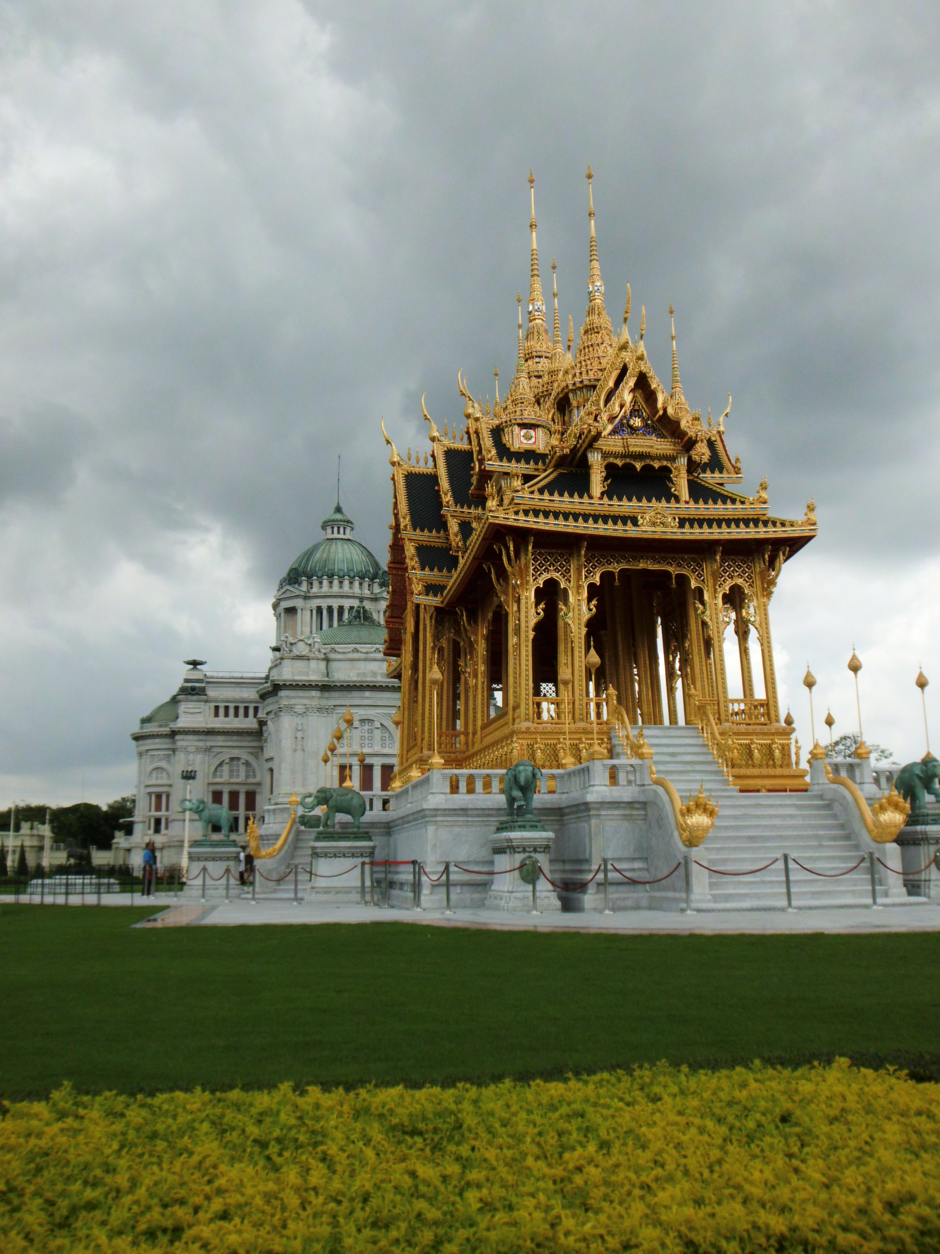 พระที่นั่งอนันตสมาคม